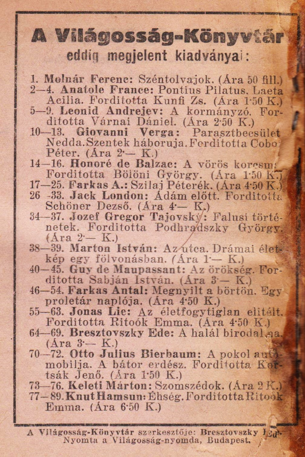 Világosság könyvtár reklám (1910-es évek)